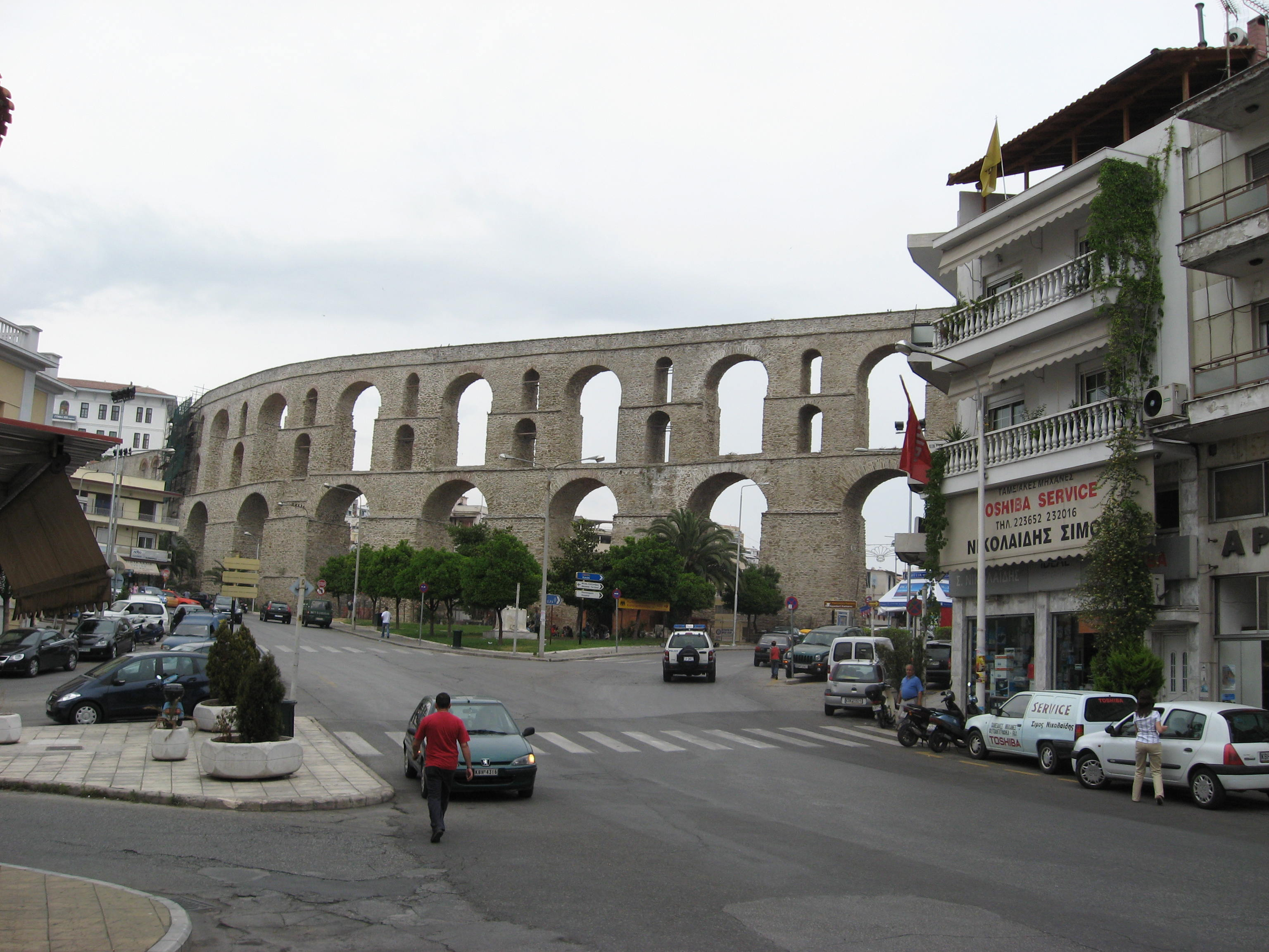 Kavala, Grčka. Autor: Dragan Cvetković, Niš.